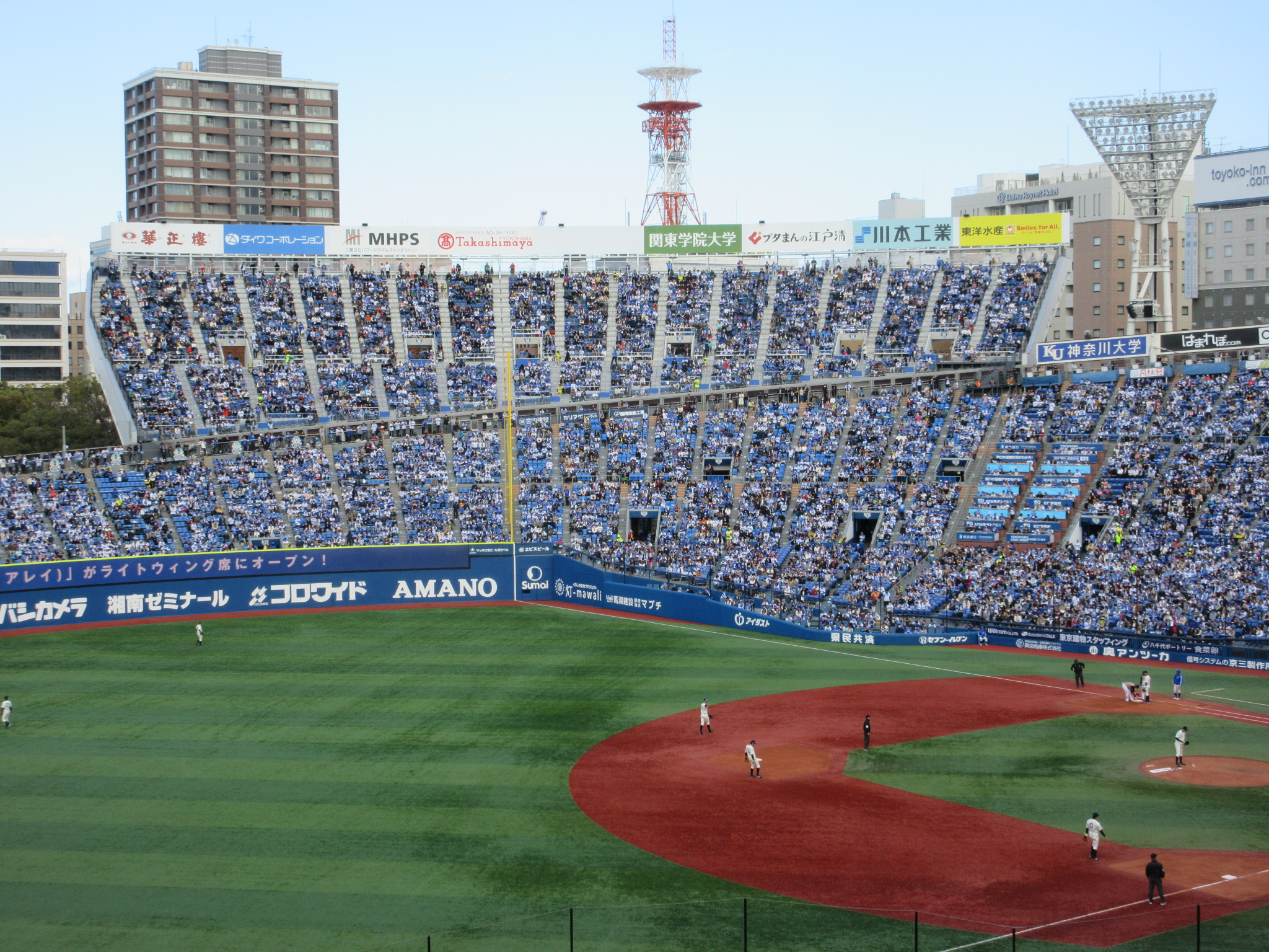 同日に開催された北海道日本ハムファイターズとのオープン戦の試合中に撮影